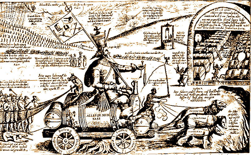 Gravure allemande anti-sémite XVIIe s